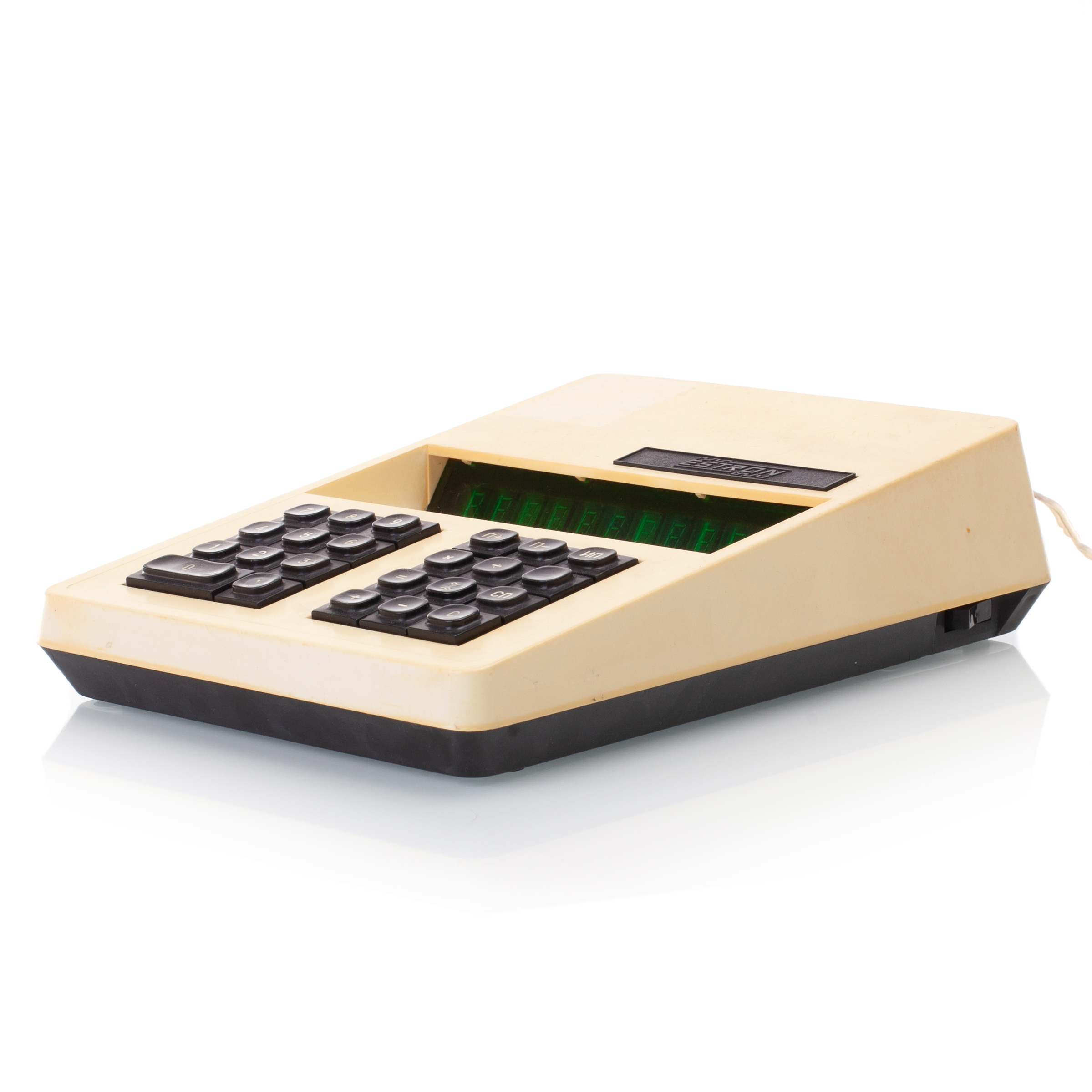 Eesti NSV-s Kuusalu kolhoosi abiettevõttes Estron valmistatud kalkulaator EA-120A